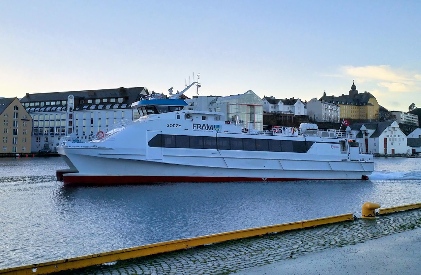 MS «Godøy» ankommer Ålesund indre havn nord den 11. desember 2018